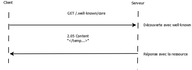 Decouverte wellknown